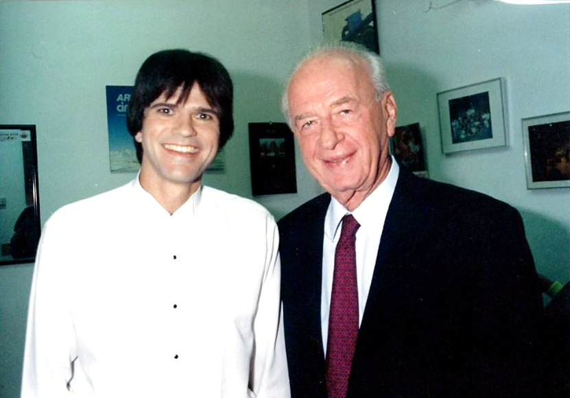 יצחק רבין וחנוך רוזן 1995